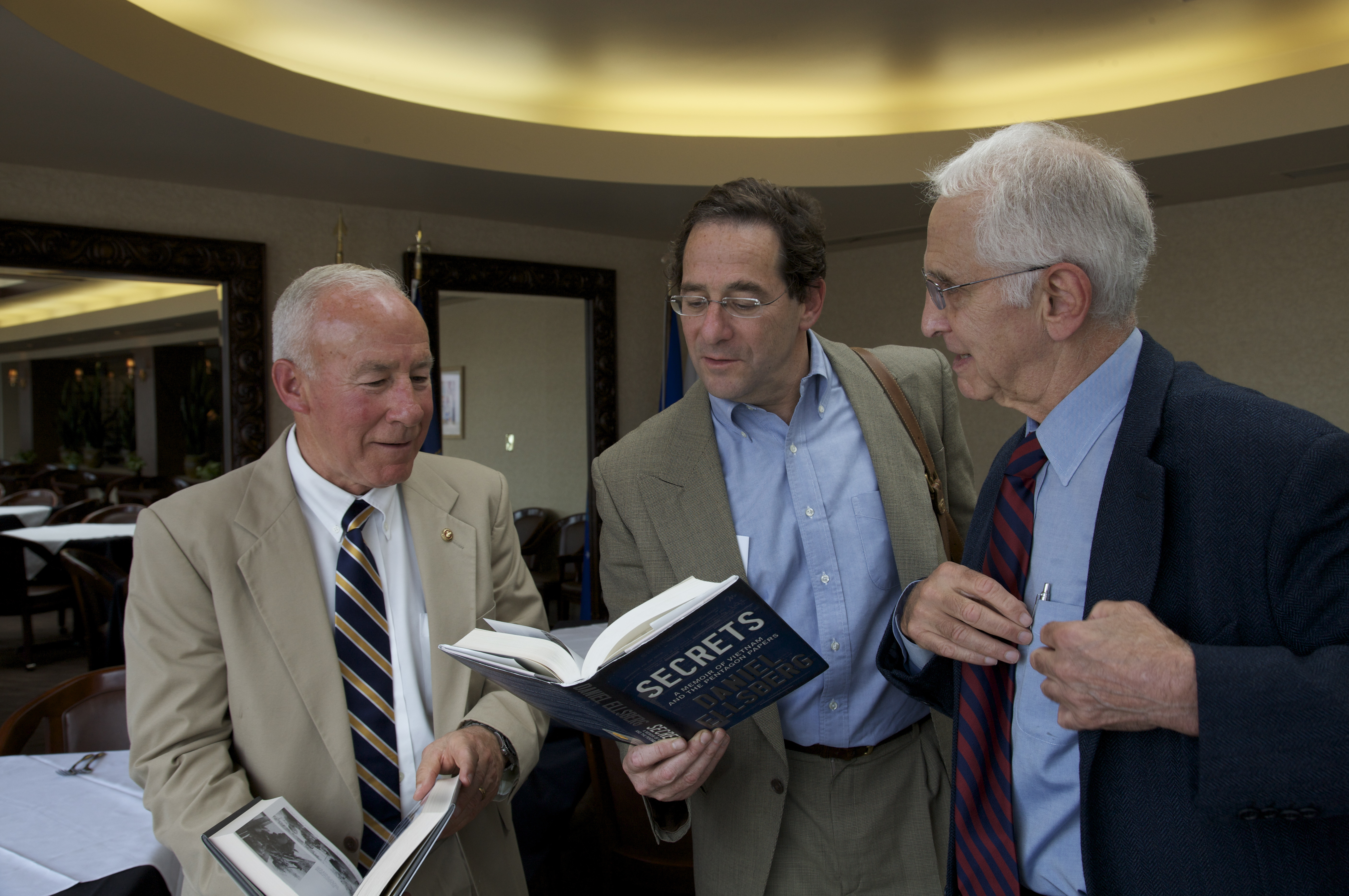 Daniel Ellsberg, Mike Myatt, & Robert Rosenthal